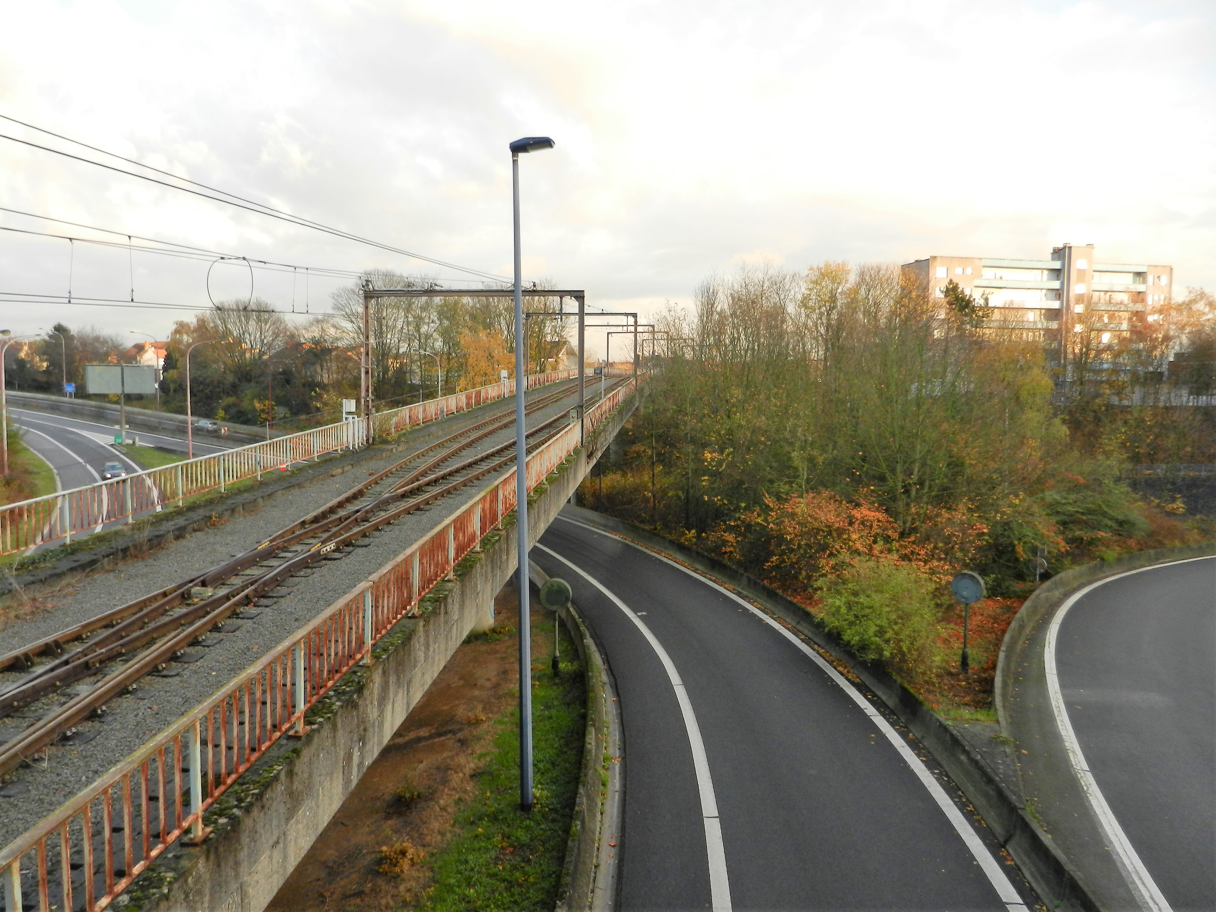 Die "Phantomlinie" nach Centenaire unmittelbar hinter der Station Waterloo. Gut erkennbar ist die Gleiskreuzung.